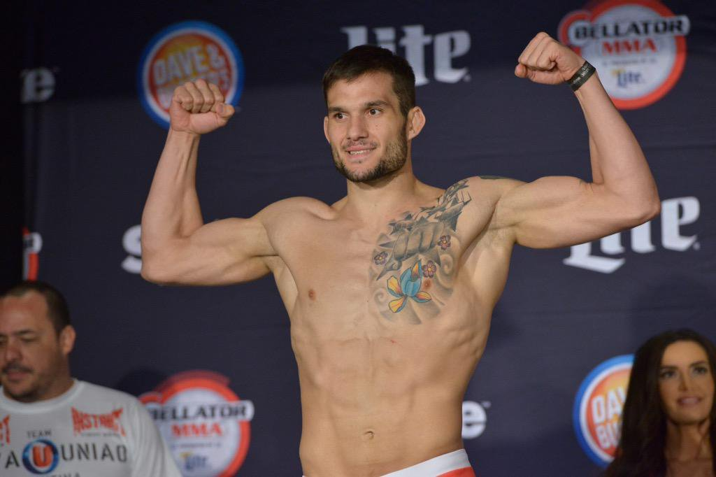 Emiliano Sordi Luchador MMA Argentina